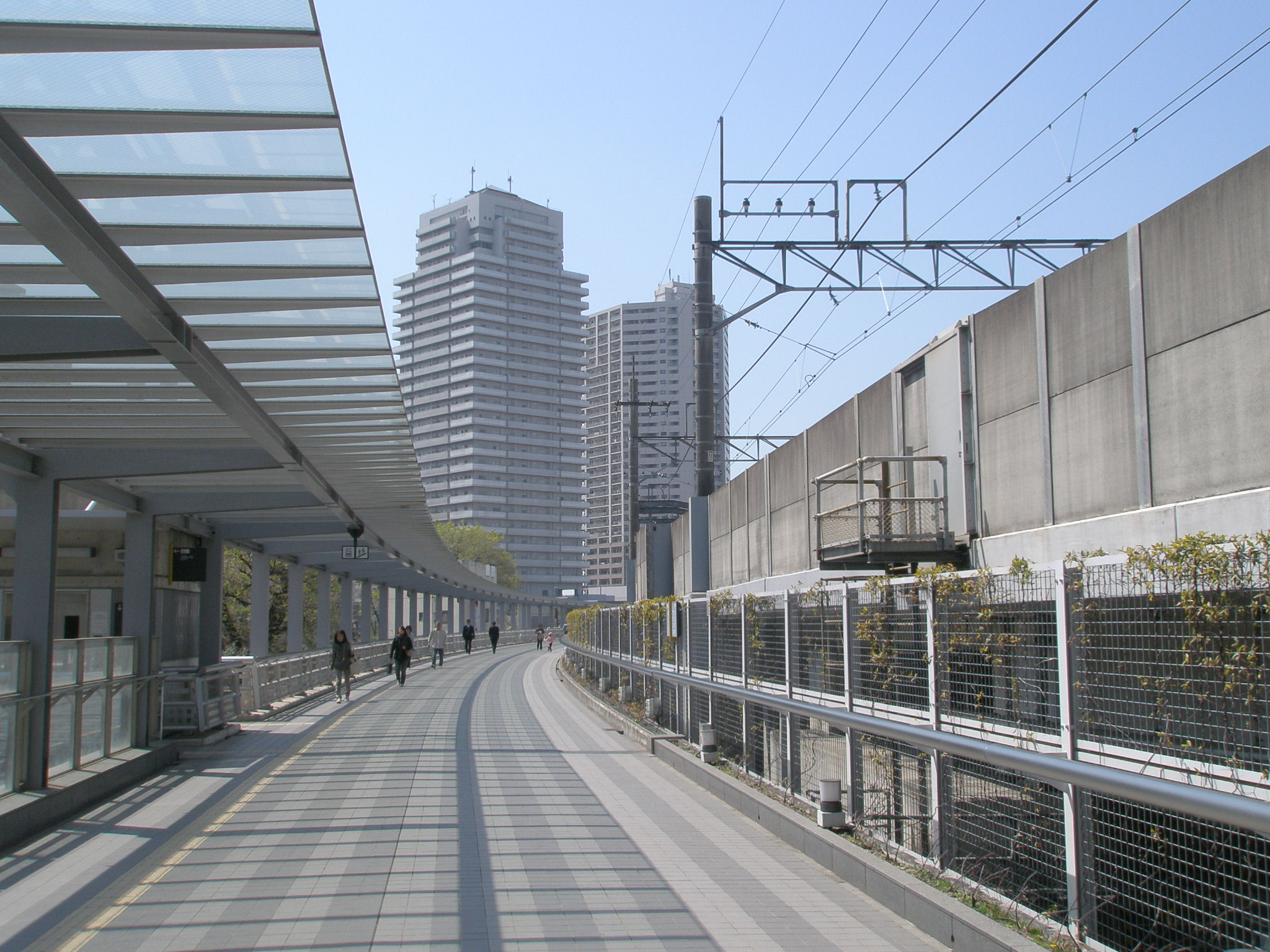 さいたま新都心から埼京線・北与野駅に向かう北与野デッキ